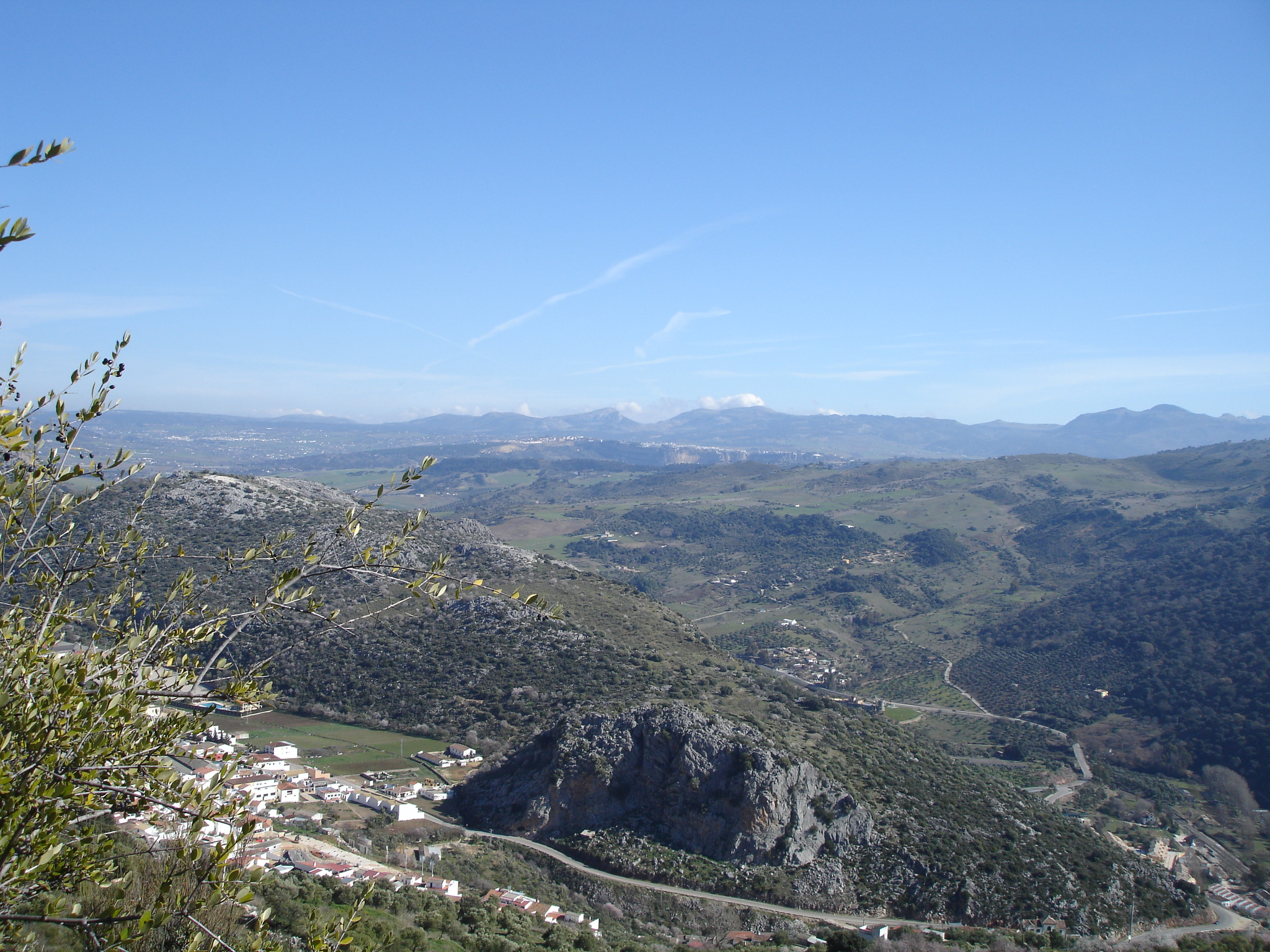 Vista superior de Benaojan y sierra de Ronda